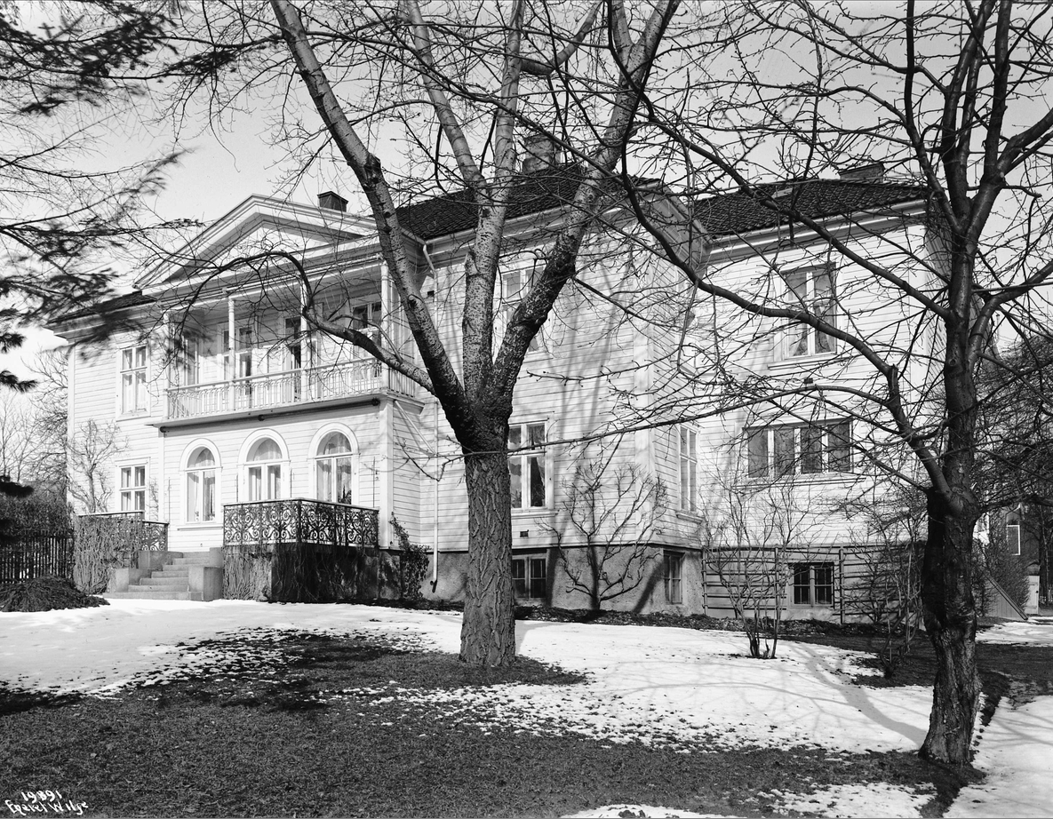 Øvre Skillebekk Løkke i Niels Juels gate 11 (revet). Foto: Anders Beer WIlse, 1919. Fra Oslo Museums samling.